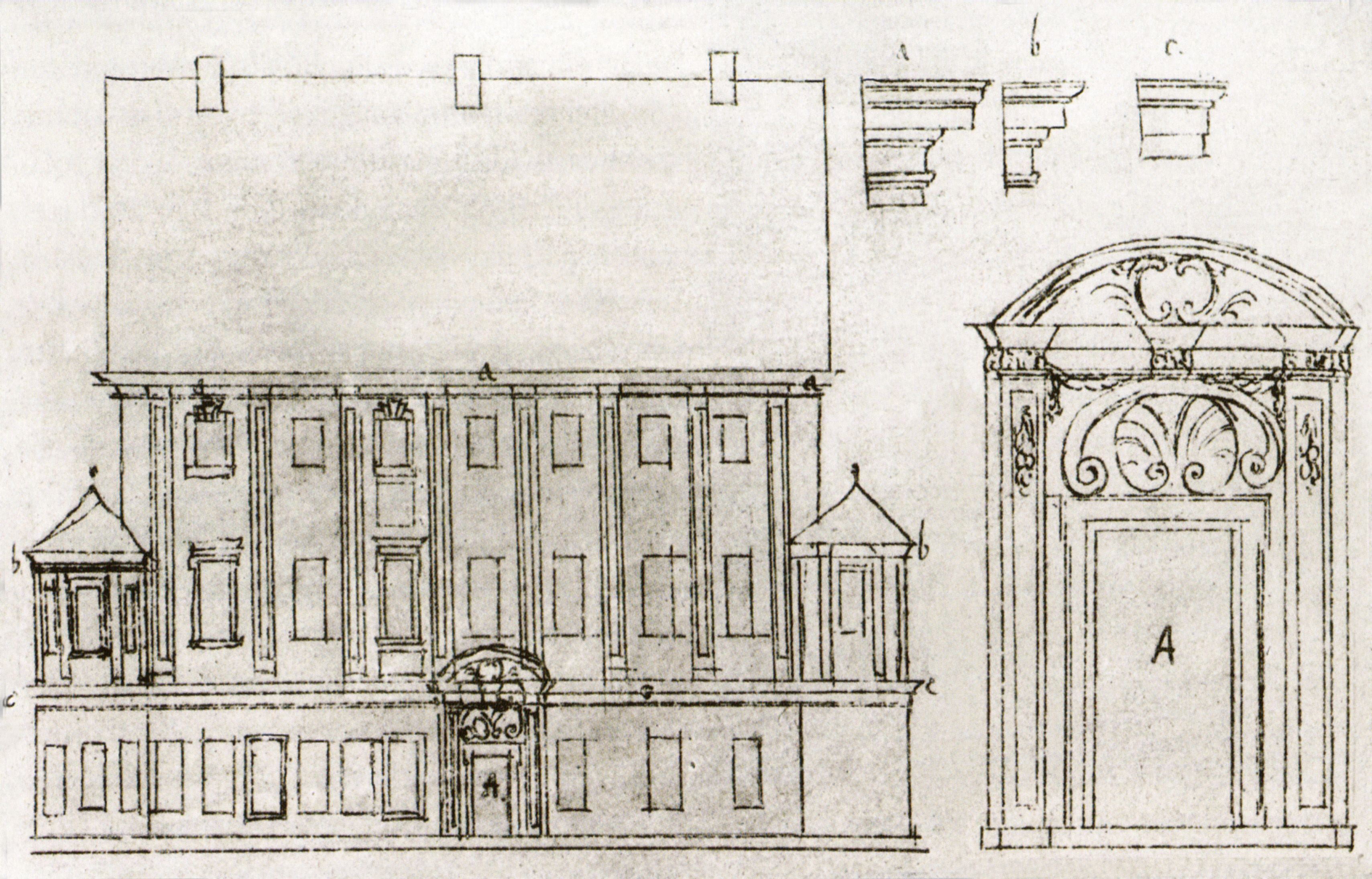 Skizze des Opernhauses am Brühl in Leipzig. Von Peter Hut in den 1990er Jahren belegt, dass es sich nicht um das Leipziger Opernhaus handelt.